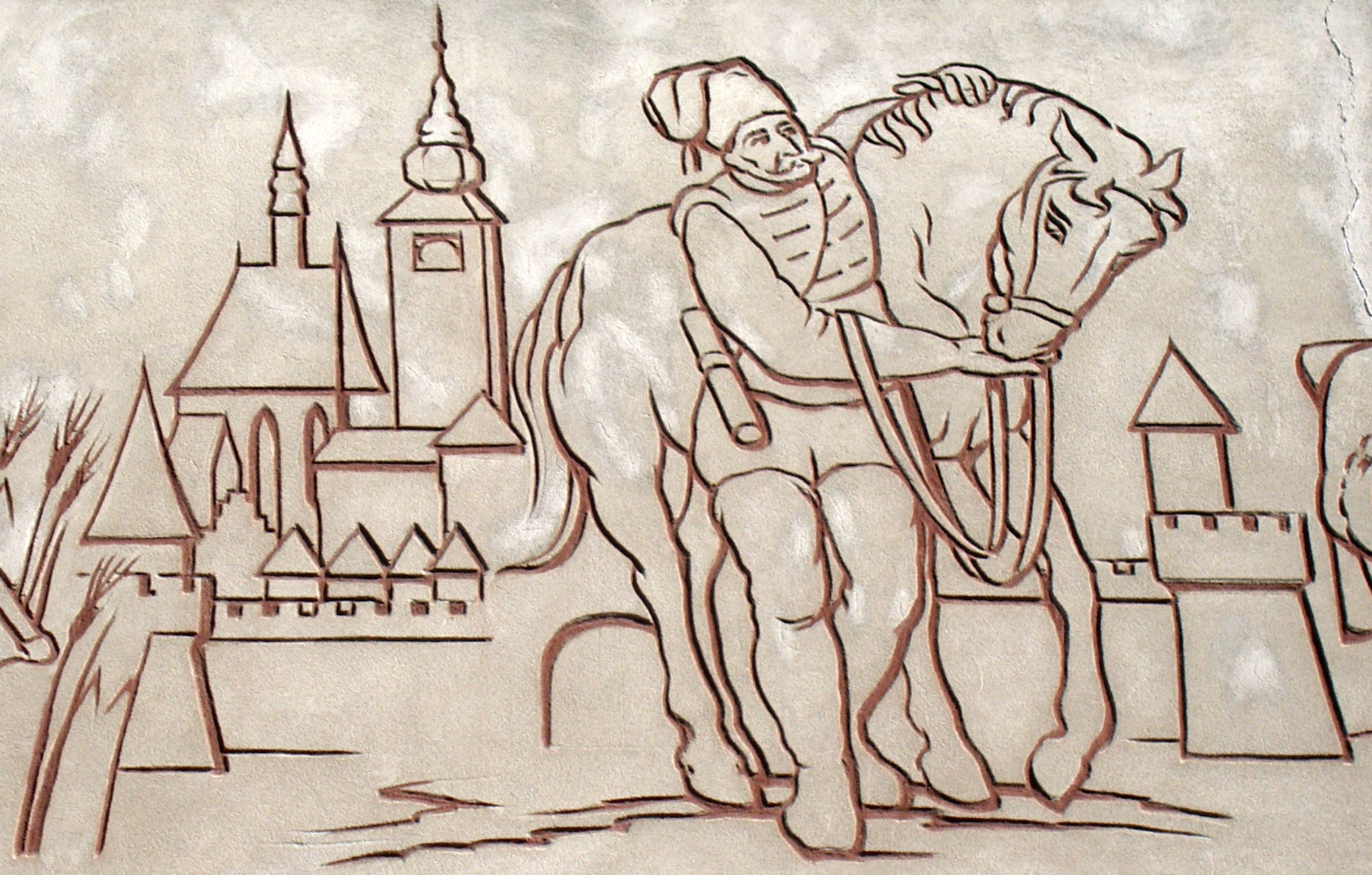 Umelecké dielo „Vývoj ľudskej spoločnosti“ (sgraffito), autor F.V.Podolay, 1952. Detail 8. časť.